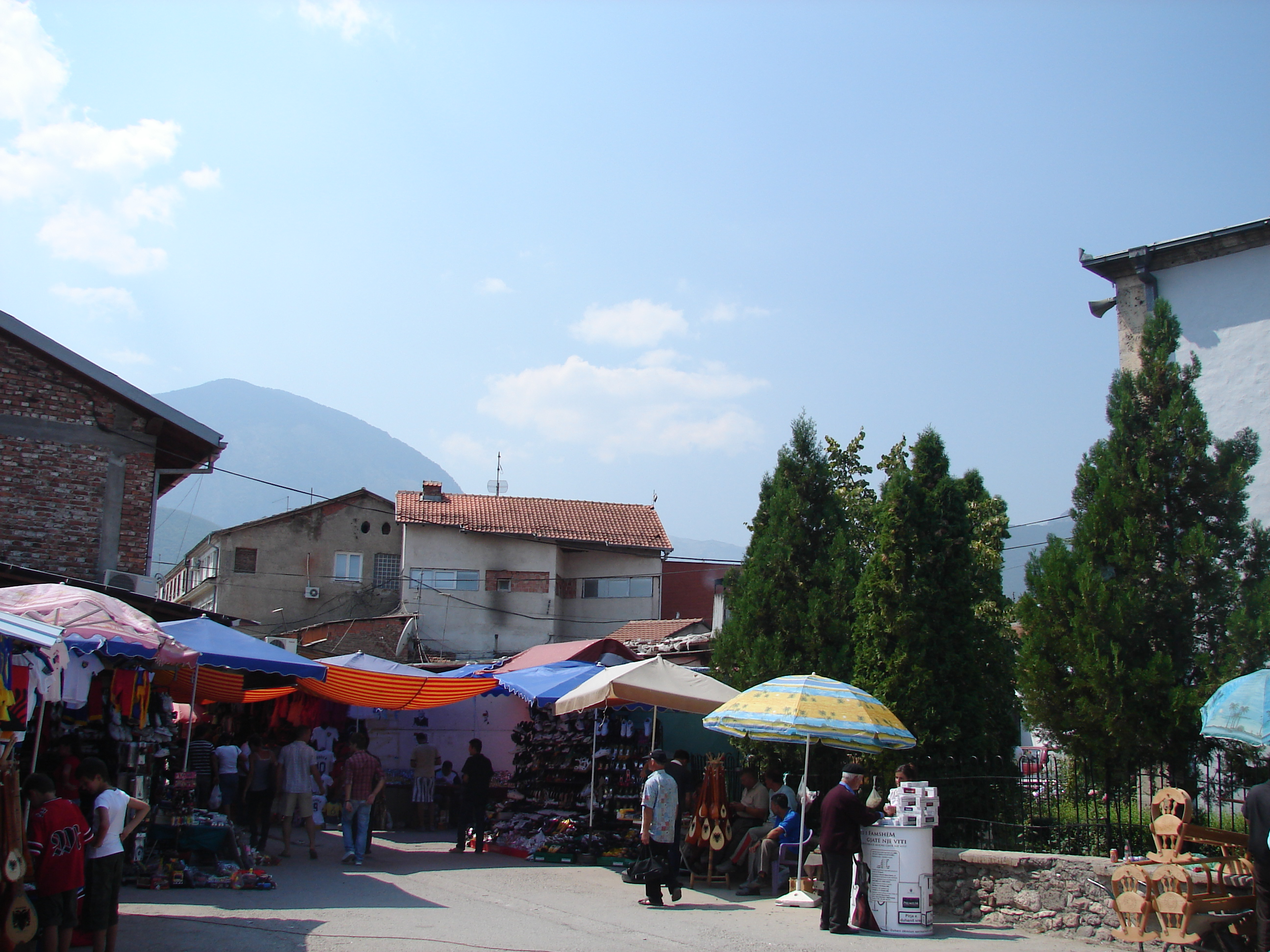 Street in Peć